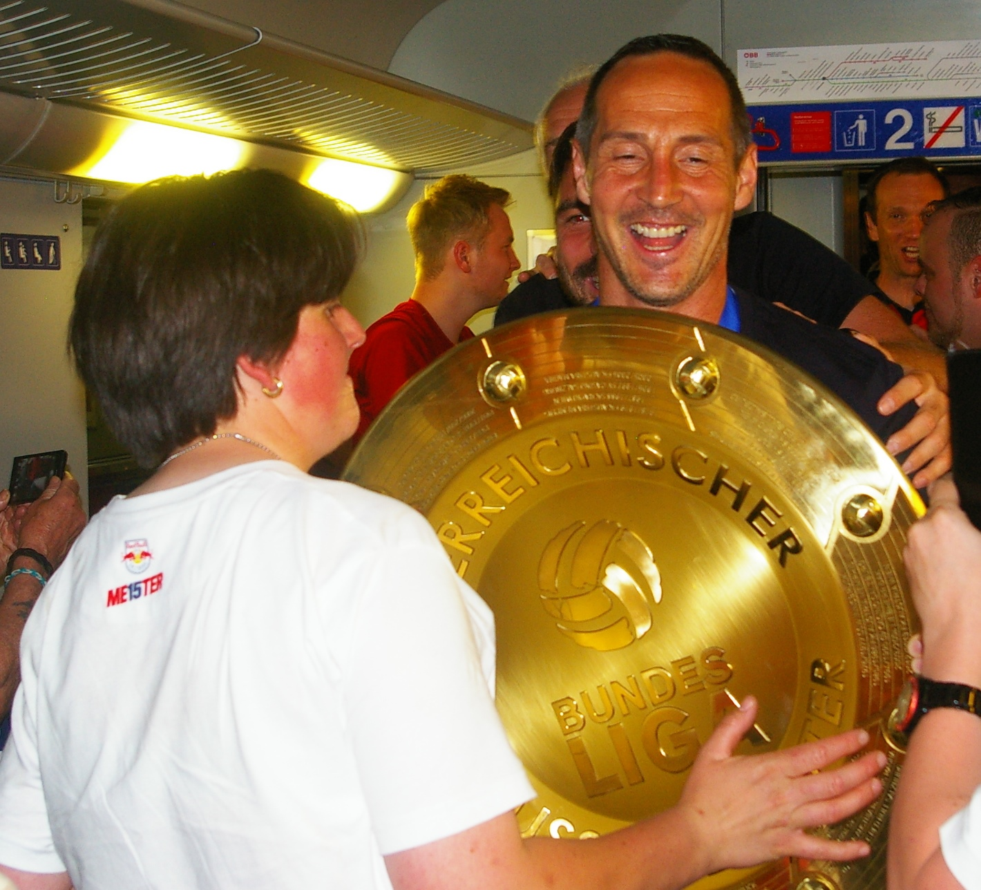 Endspiel des ÖFB Cups gegen Austria Wien 2:0 Die Mannschaft reiste ihm Fanzug zurück nach Salzburg